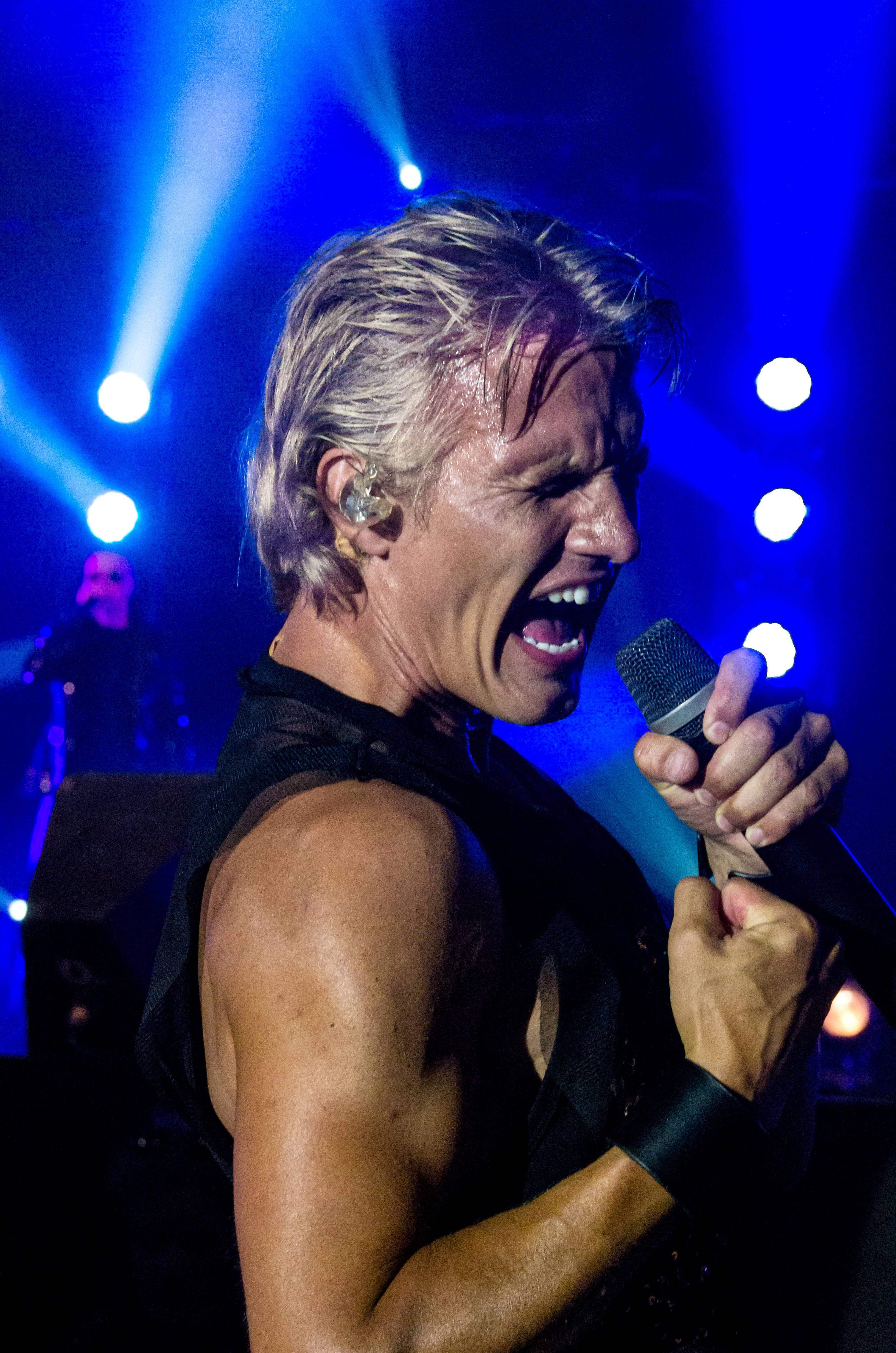 Bilder vom ZMF 2015, die Gala FORK am 15. Juli 2015